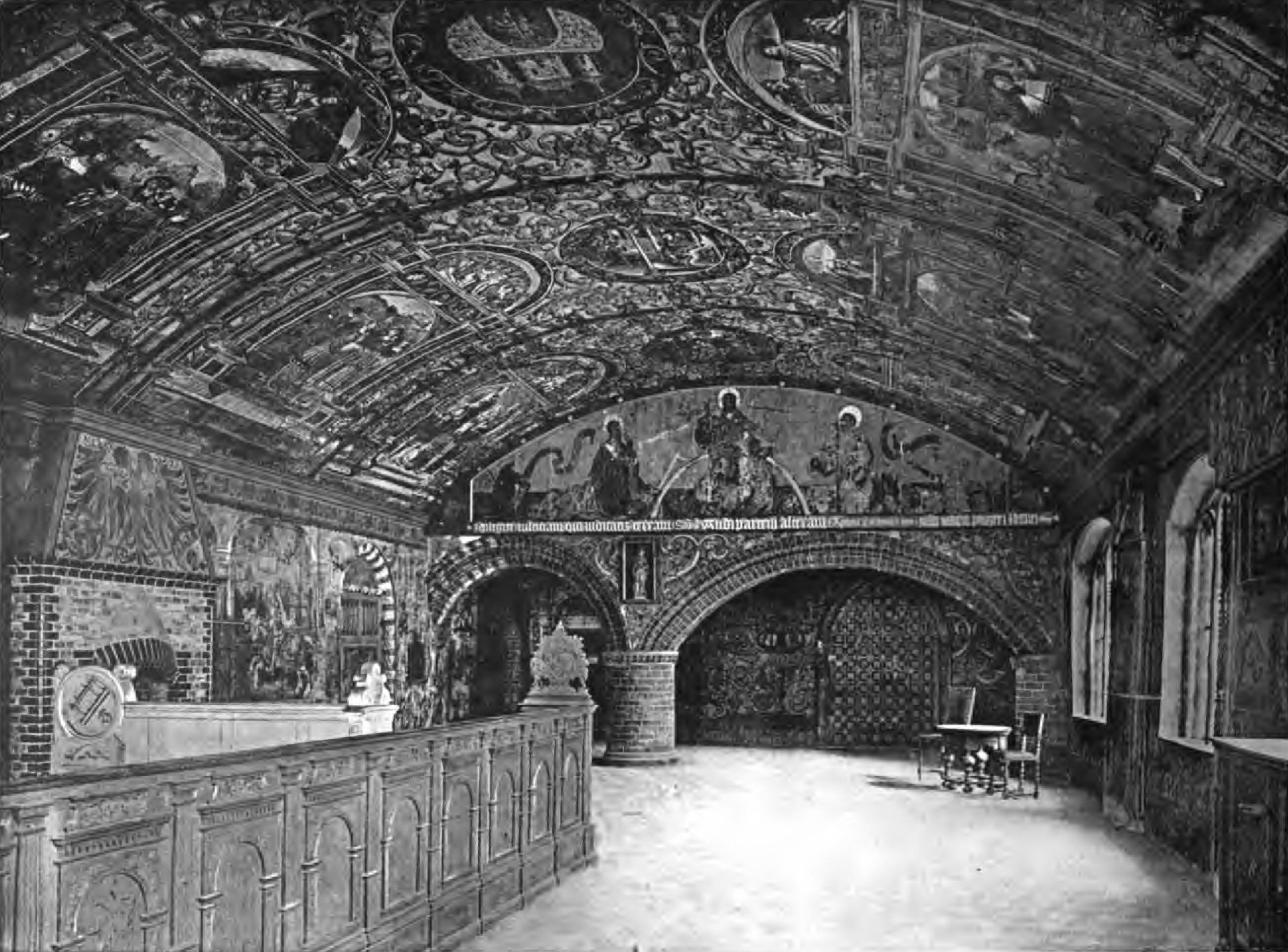 Lüneburg, Rathaus Blick in die Laube